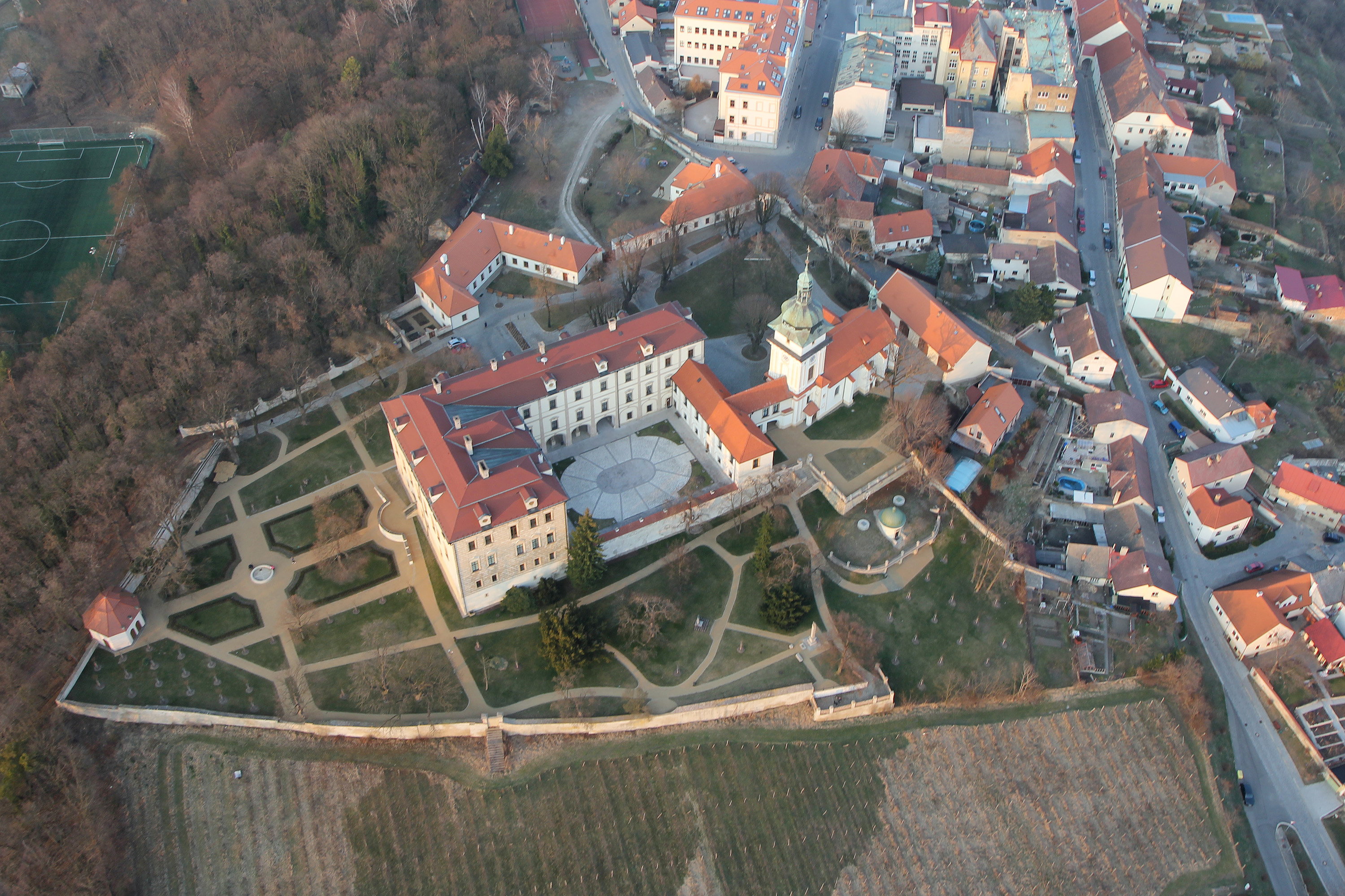 Zámek Benátky nad Jizerou, Husovo nám. 49, Benátky nad Jizerou